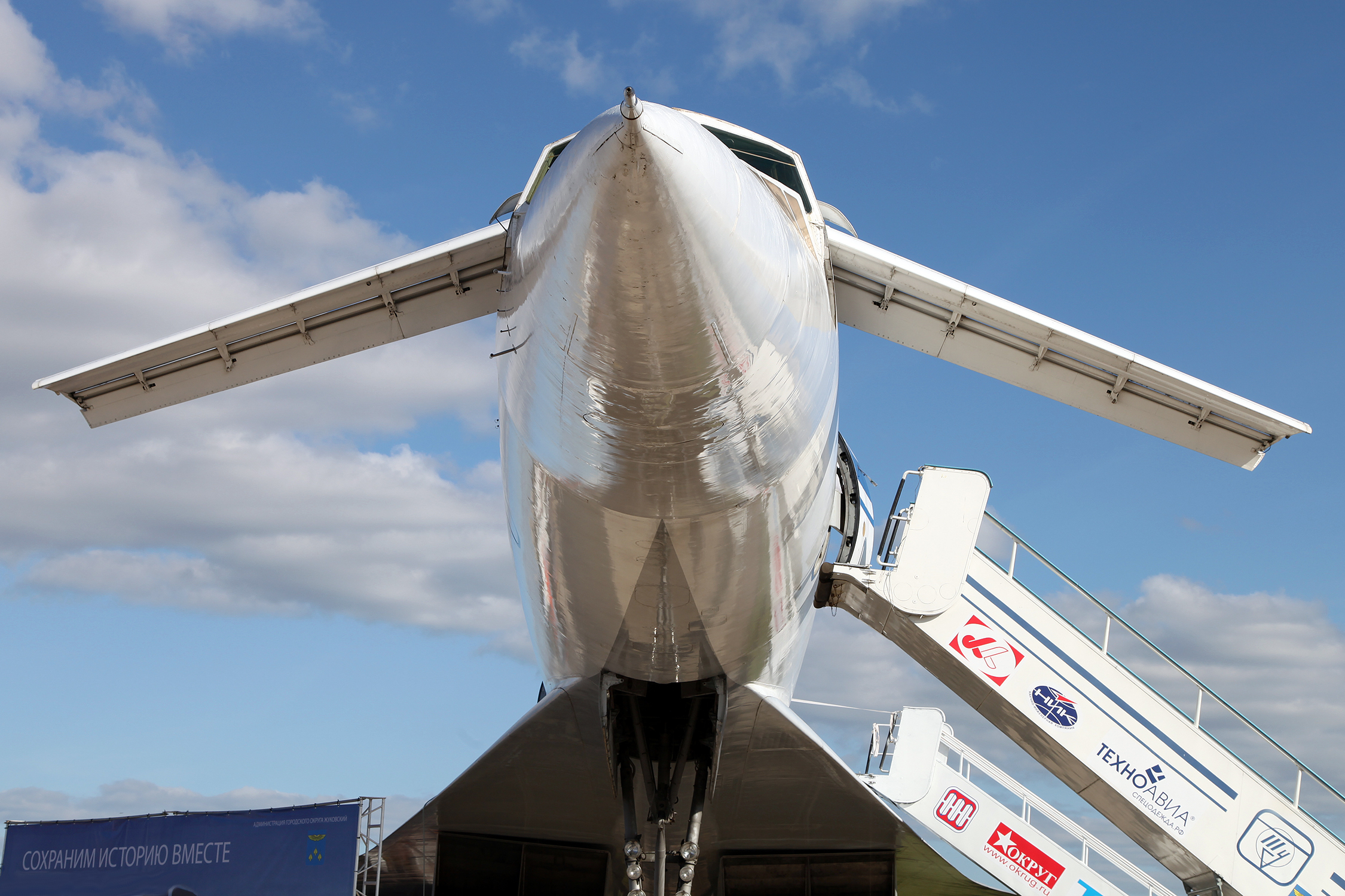 Ту-144 (Tu-144)